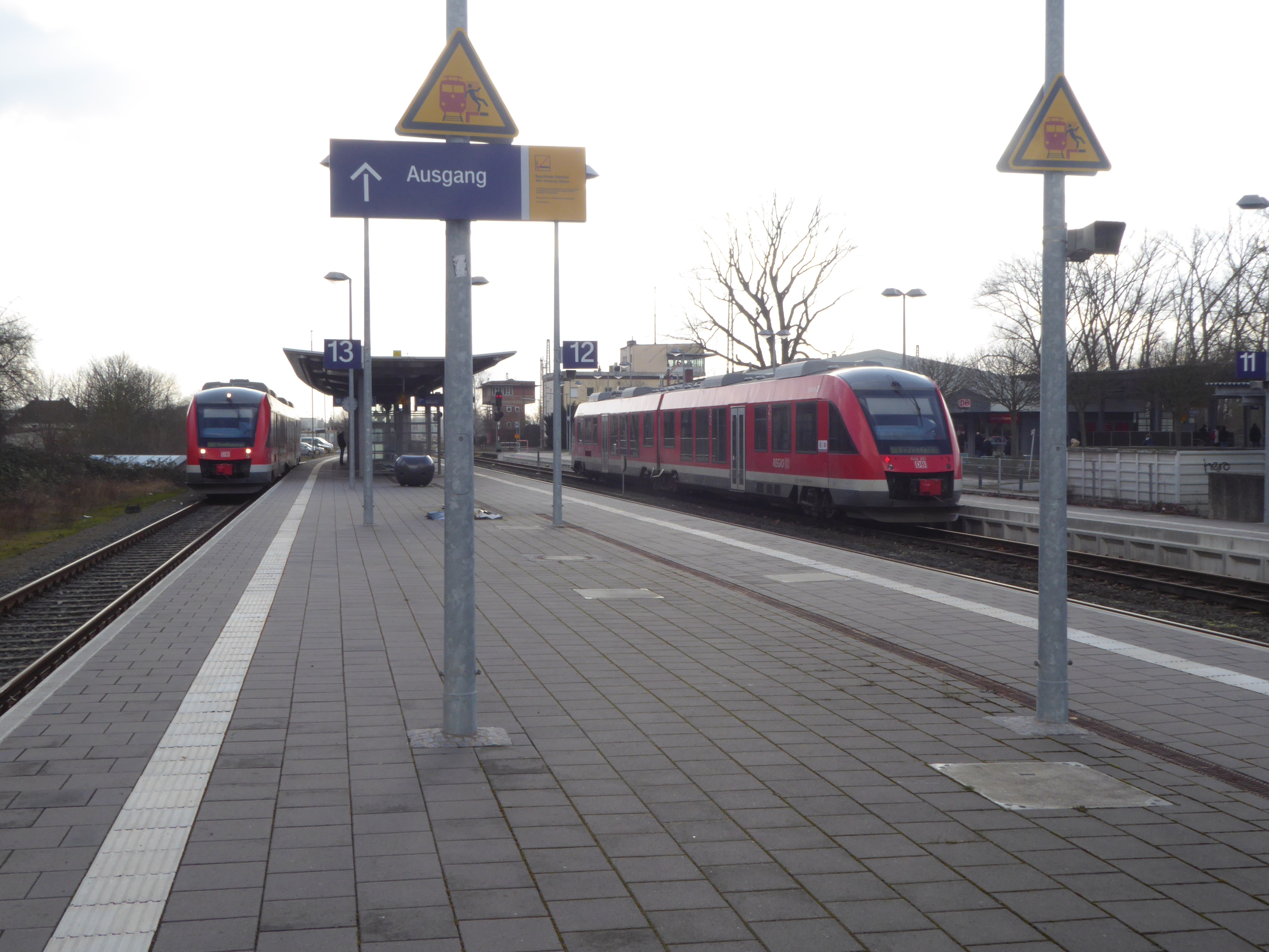 Bahnsteig auf der Ostseite des Bahnhofs Northeim, Blick von Norden. Hier fahren die Züge der Südharzstrecke und der Sollingbahn.